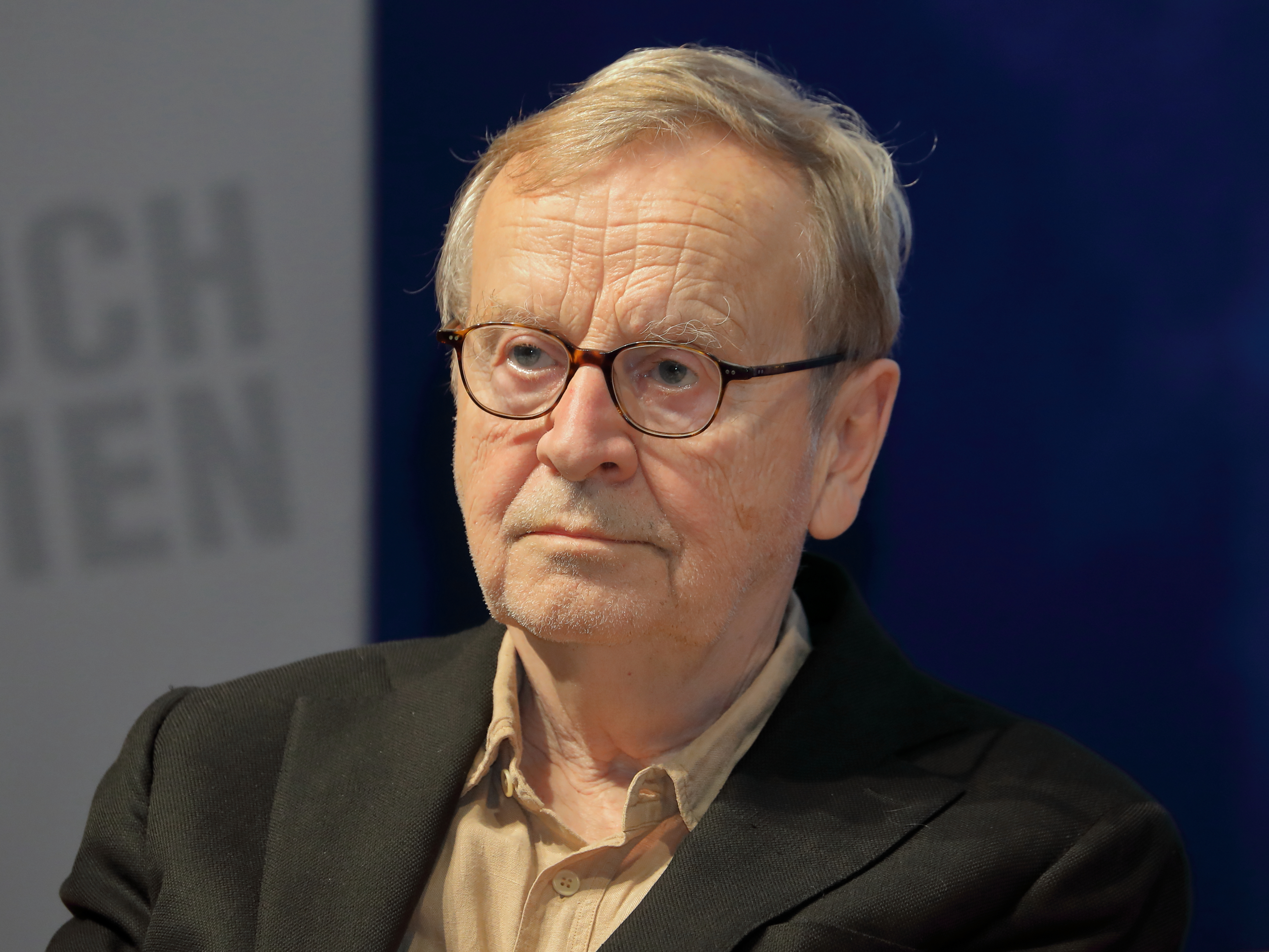 Der finnisch-schwedische Schriftsteller Johan Bargum auf der Wiener Buchmesse 2019.